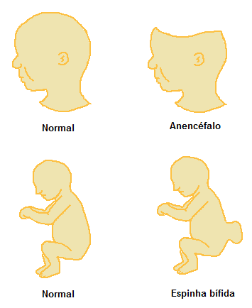 Exemplos de má formações da Nêurula